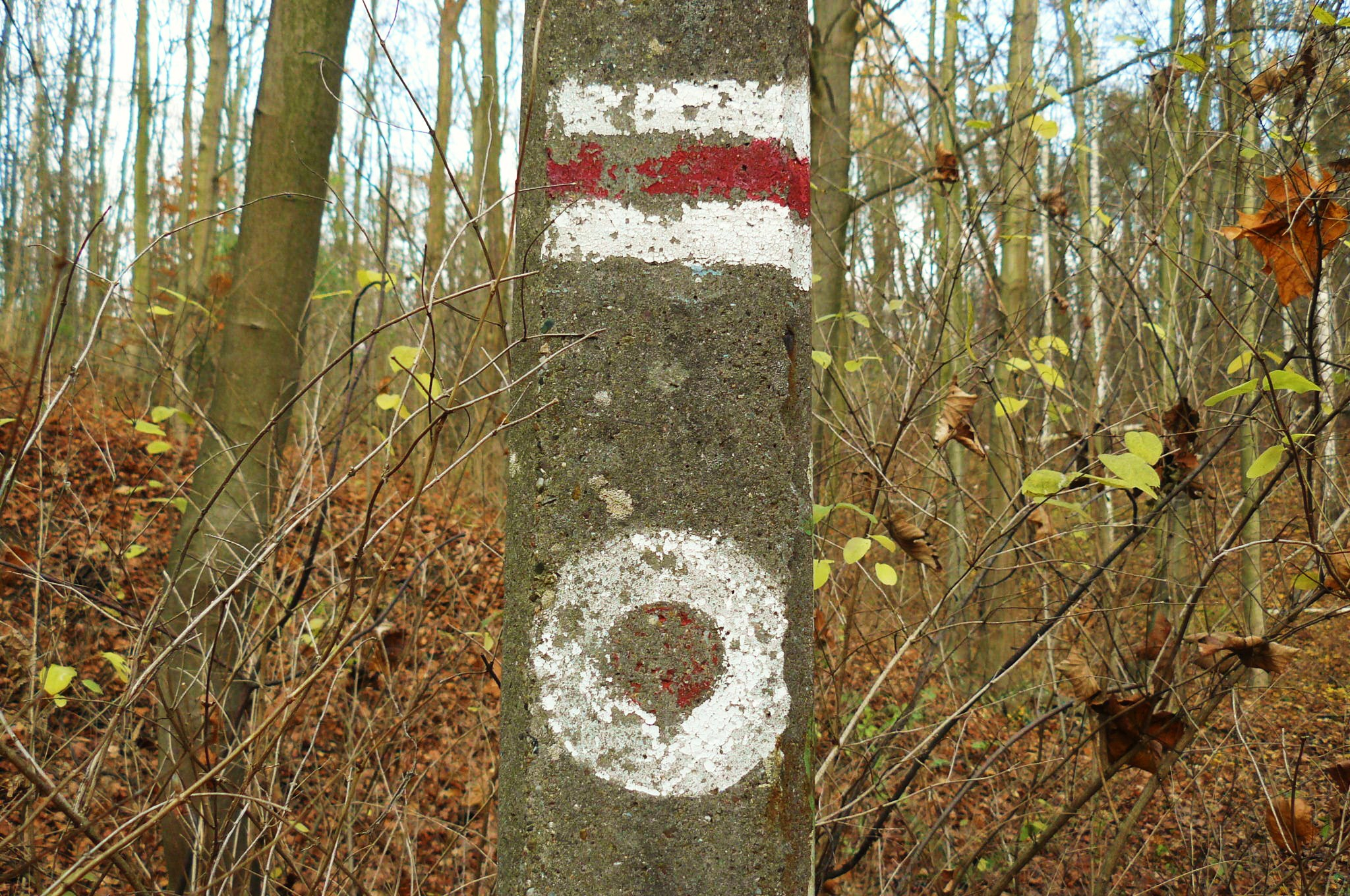 Szlak turystyczny - Mosina Pożegowo. Wielkopolski Park Narodowy.